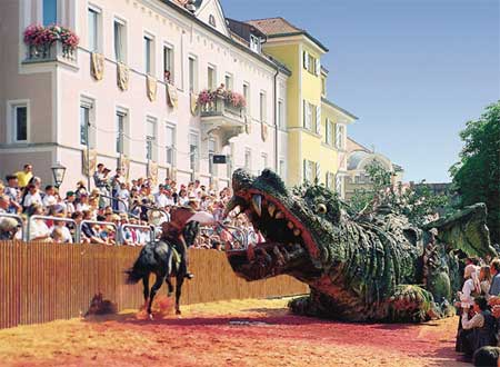 Further Drachenstich